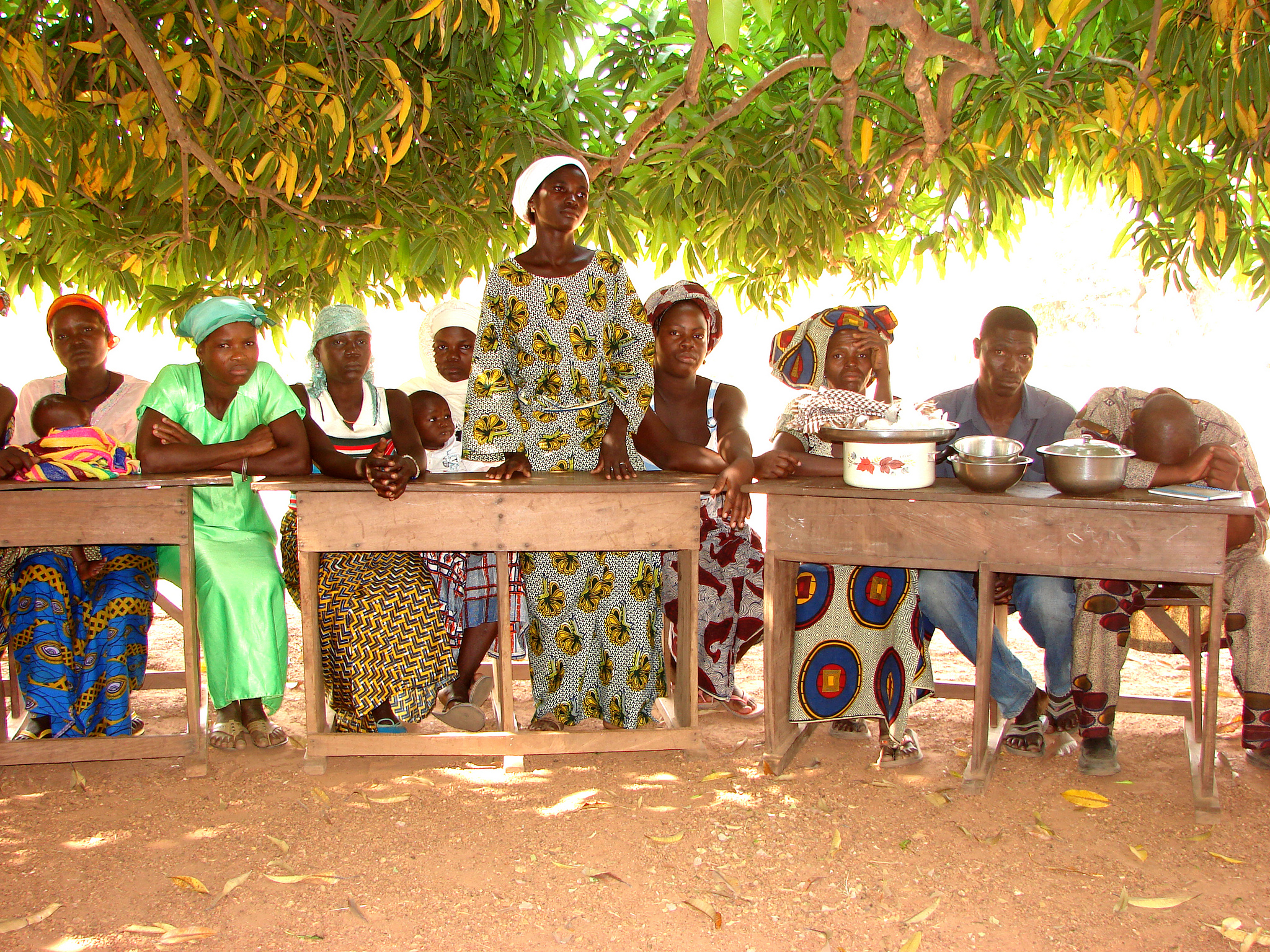 Benin. André Roussel/USAID